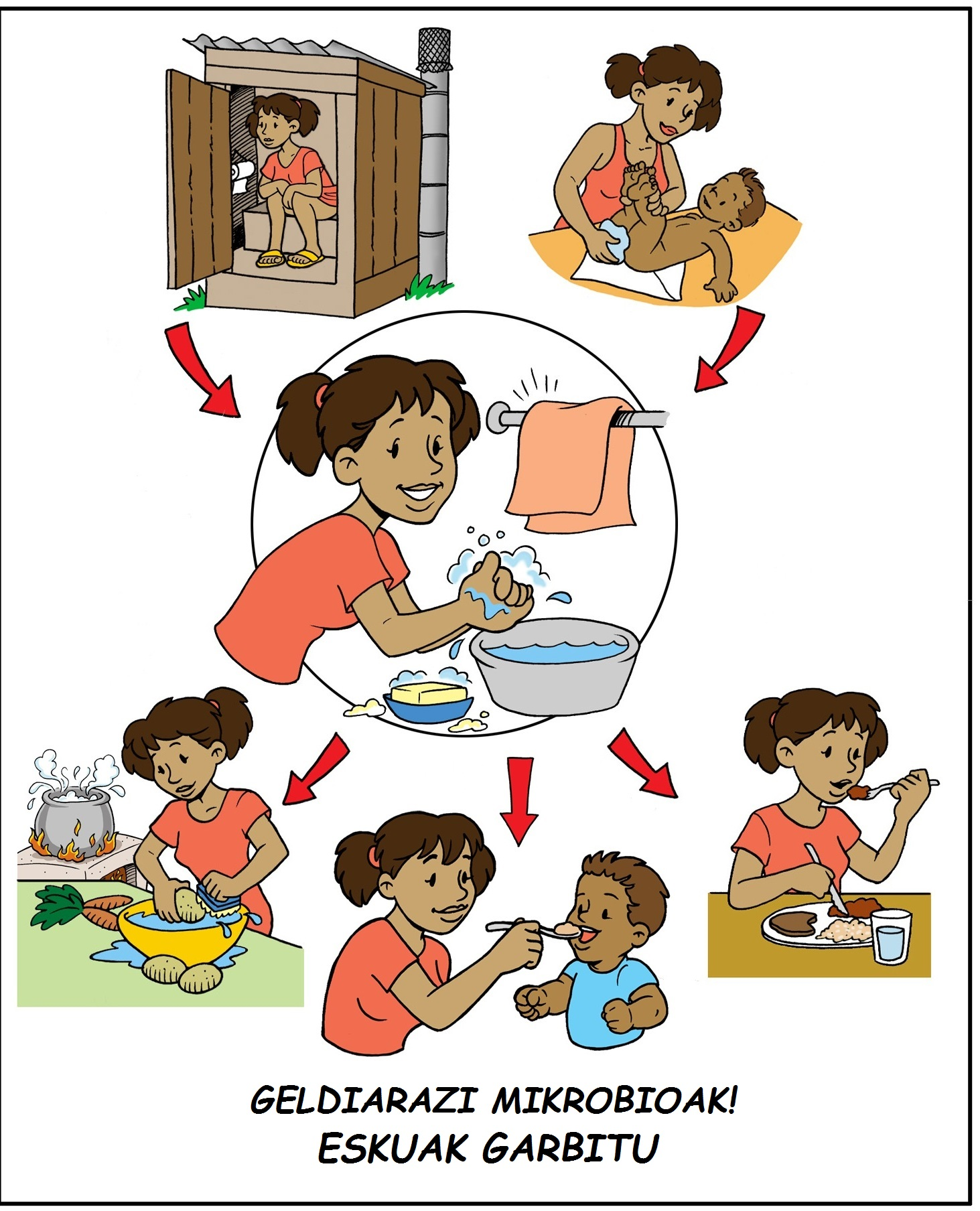 Eskuak garbitzeko deia - posterra